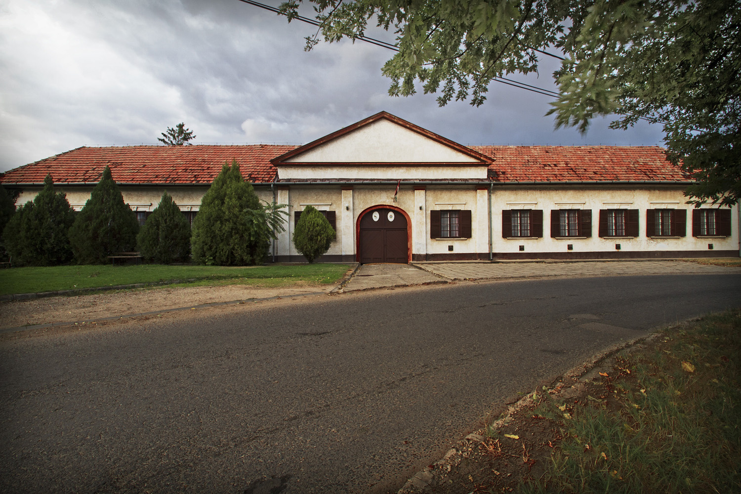 Zeneiskola - Dabas, Bajcsy-Zsilinszky u. 17.